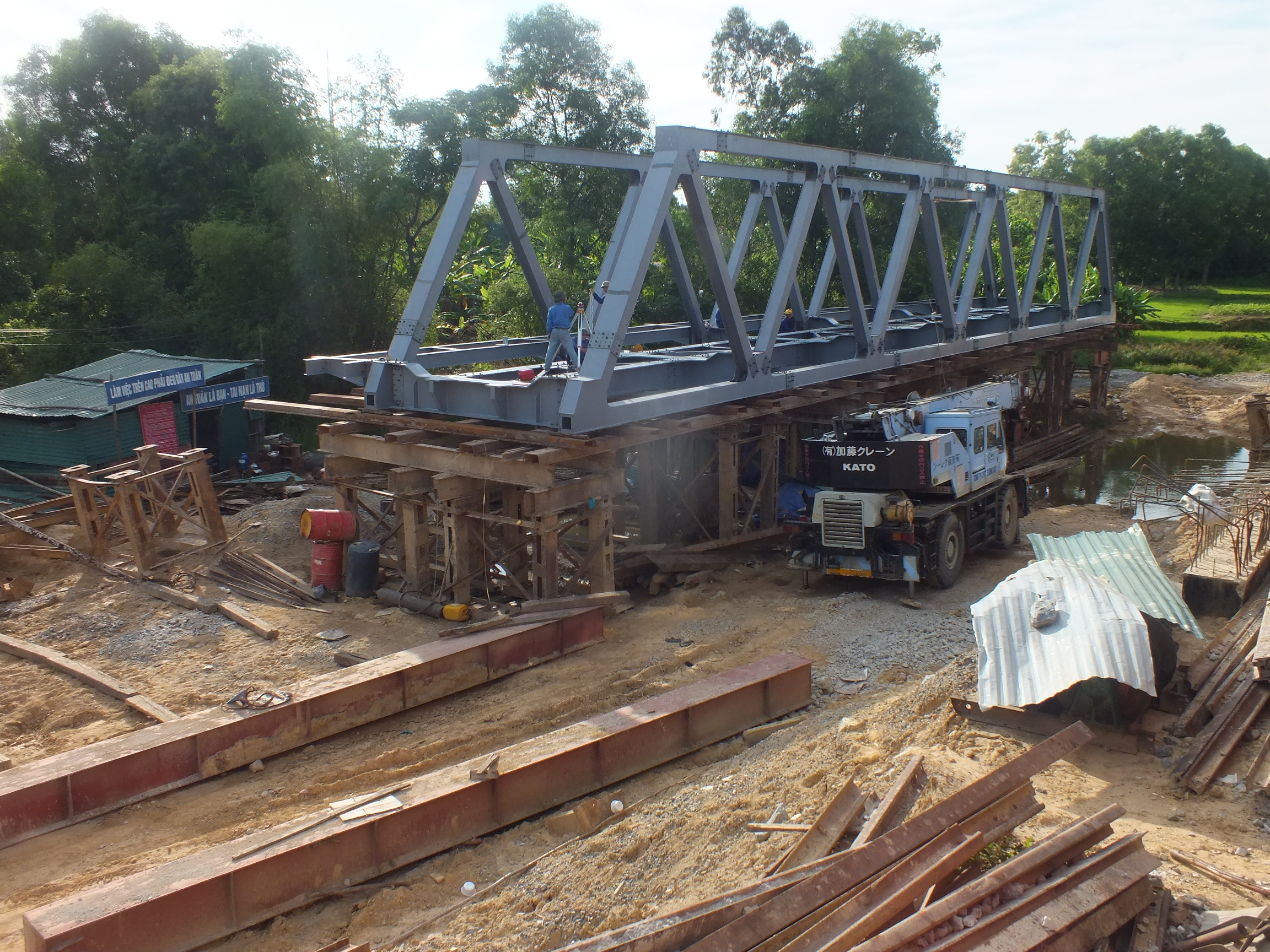 2013-07-16 North–South Railway (Vietnam)SE20